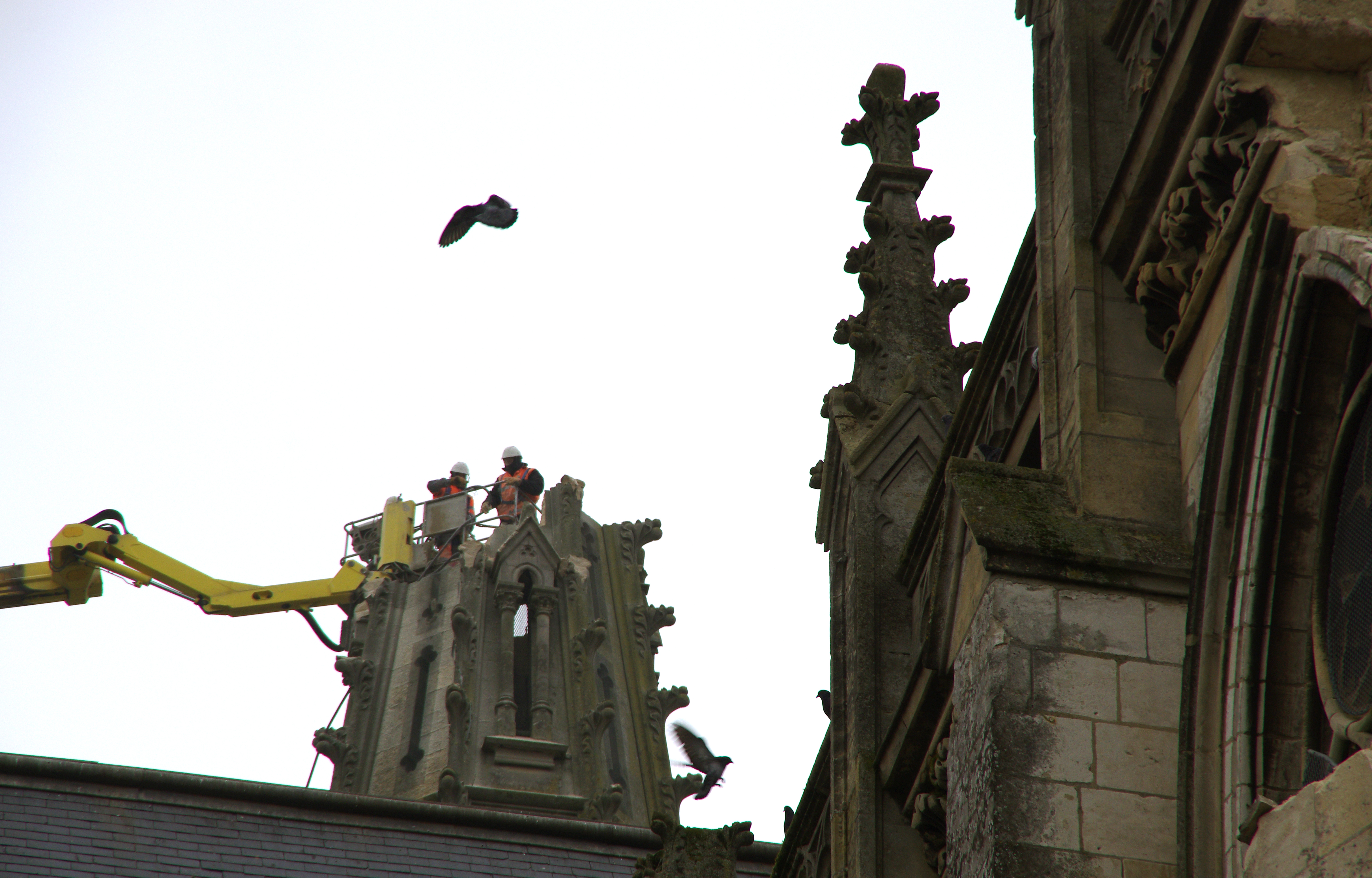 Abbeville (Somme, France) - L'église Saint-Jacques est condamnée à la démolition qui a commencé à la mi-février 2013. Après l'éventrement de son chevet et la dépose du coq et de la croix, des ouvriers installés dans la nacelle d'une grande grue venue de Belgique s'attaquent à la pointe du clocher, dont la flèche a déjà perdu la moitié de sa hauteur. Les pierres qui tombent à l'intérieur heurtent parfois la cloche, ce qui rompt un peu le bruit du marteau-piqueur. Mais chaque tintement de cloche (environ 2 ou 3 par heure) ne contribue bien sûr pas à l'apaisement des opposants à la destruction aussi rapide de l'édifice entamée sans concertation, disent-ils, et sans avoir pris le soin et le temps d'en sortir la ou les cloches, l'orgue, et une grande partie du mobilier. .